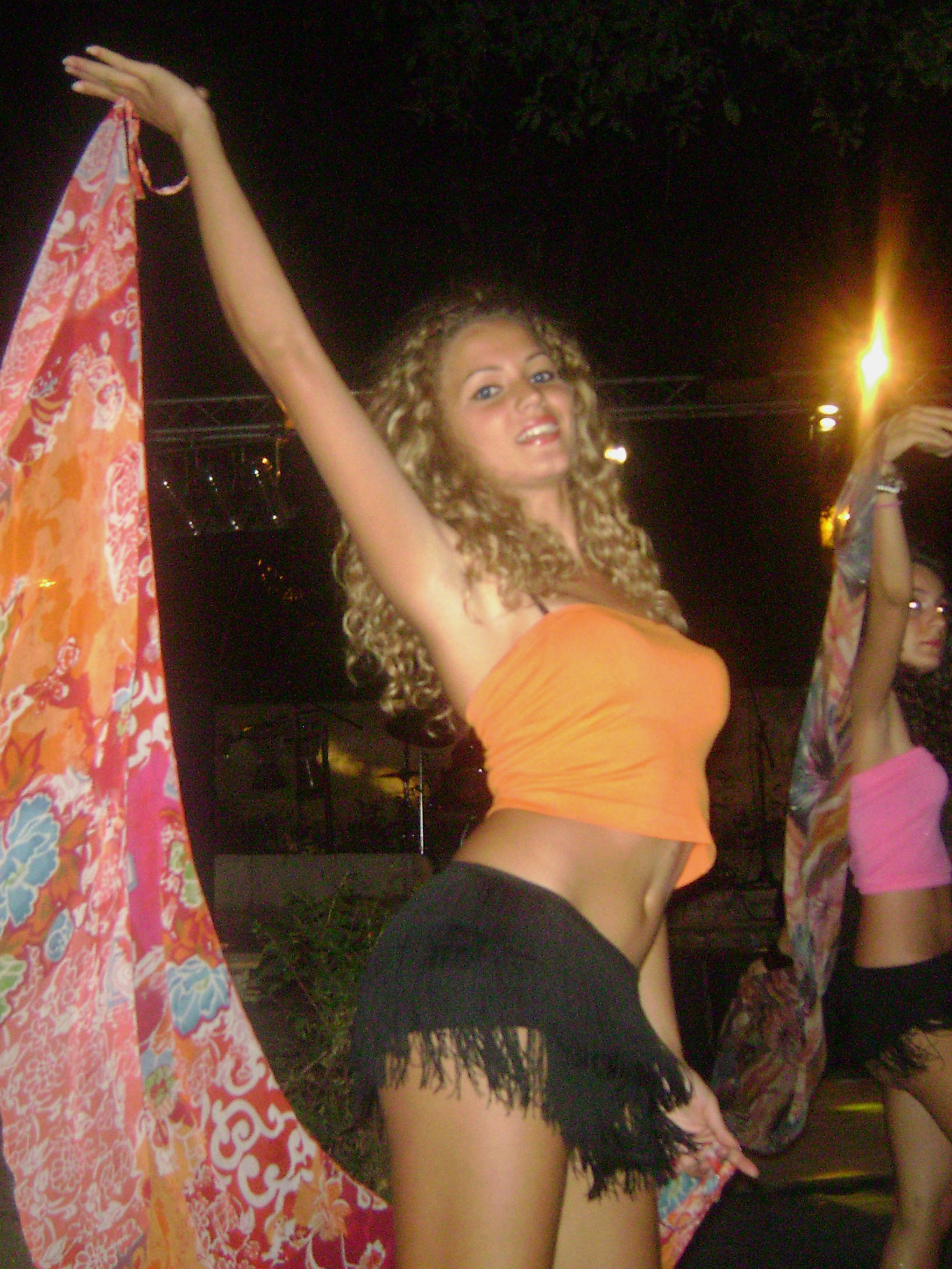 Santa Margherita di Belice, villa del Gattopardo, agosto 2010. L'attrice italiana Giusy Buscemi in un'esibizione di gruppo pubblica di danza moderna.